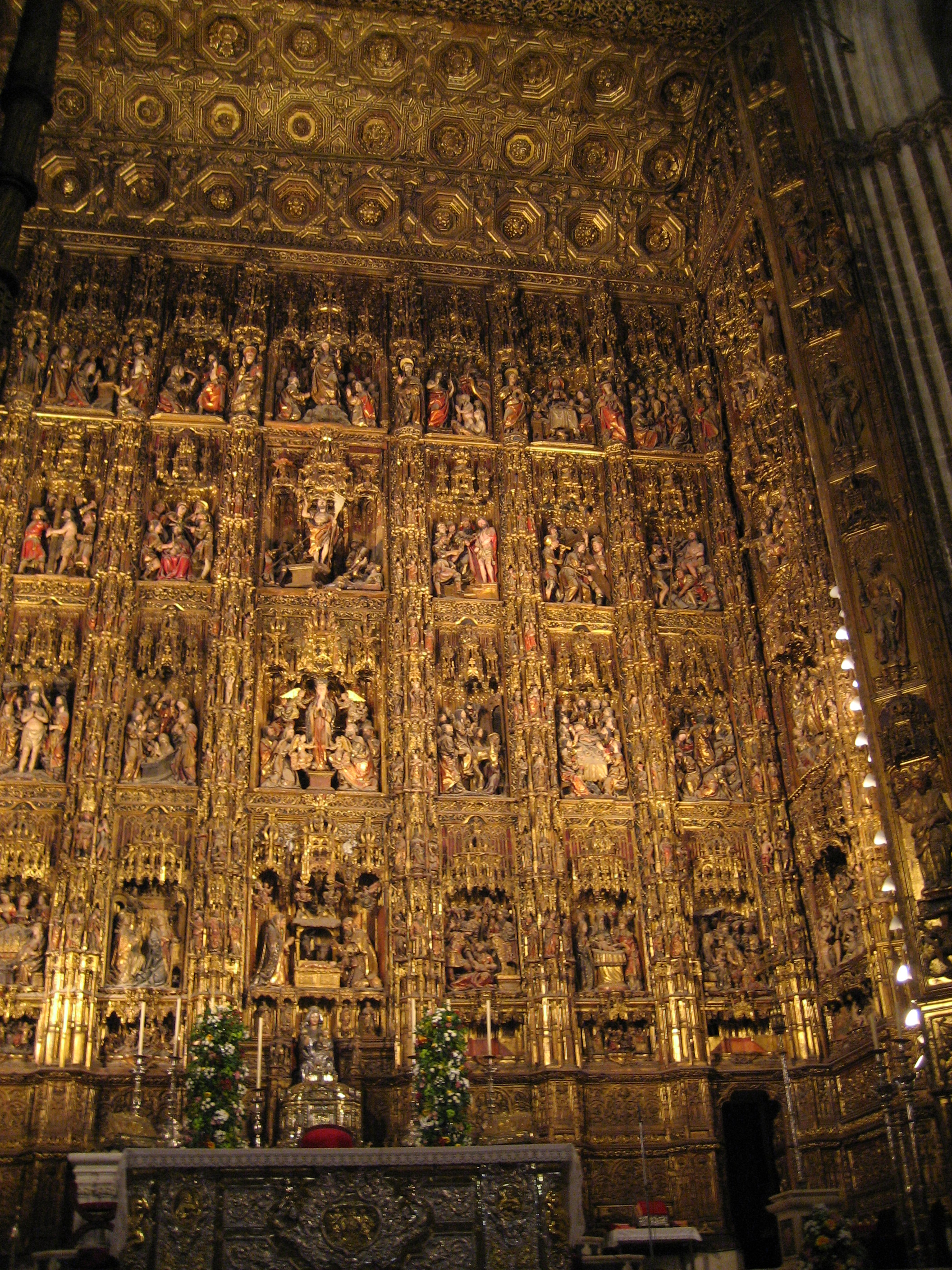 Retablo mayor de la catedral de Sevilla, (España).